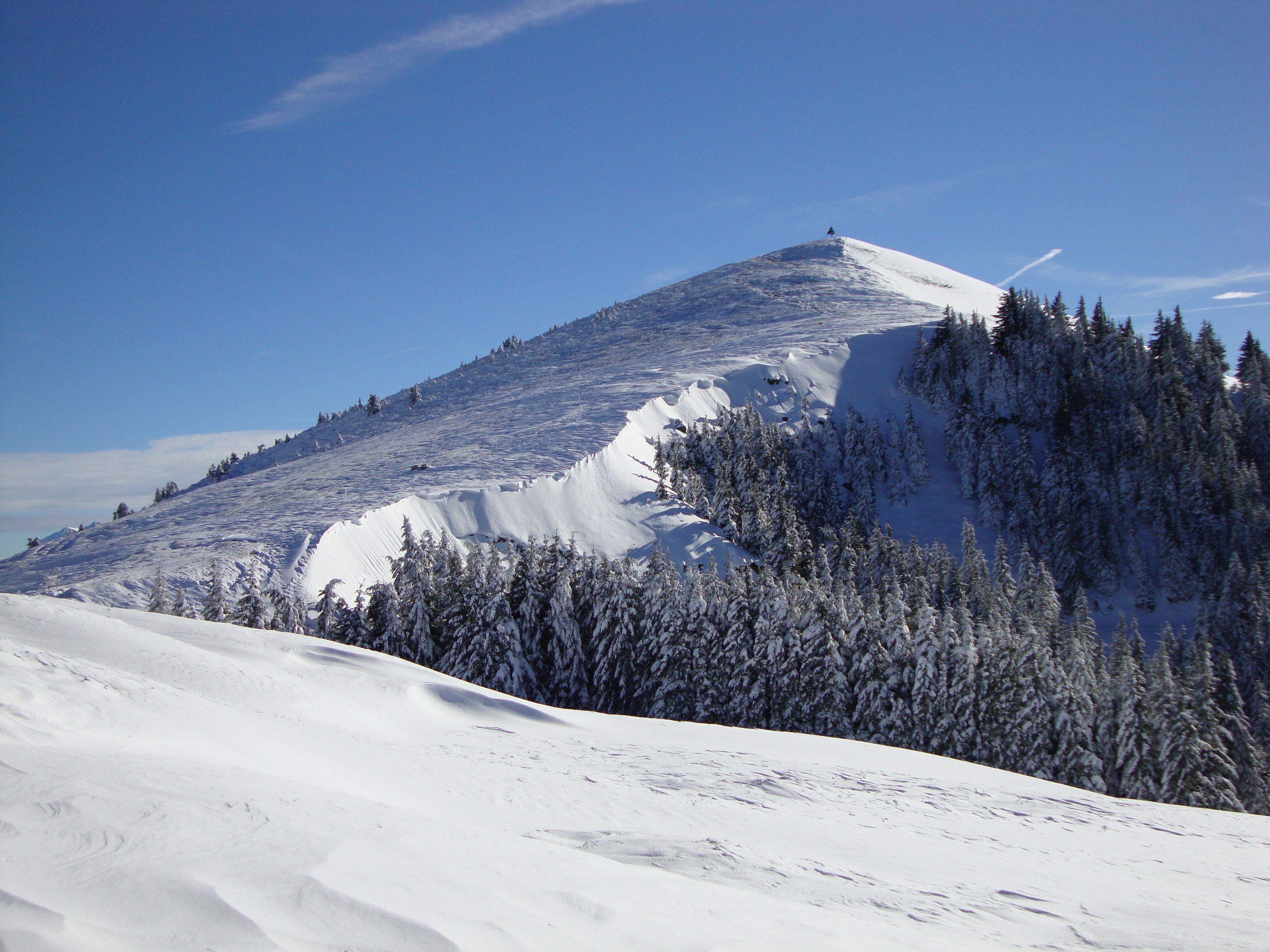 La Berra